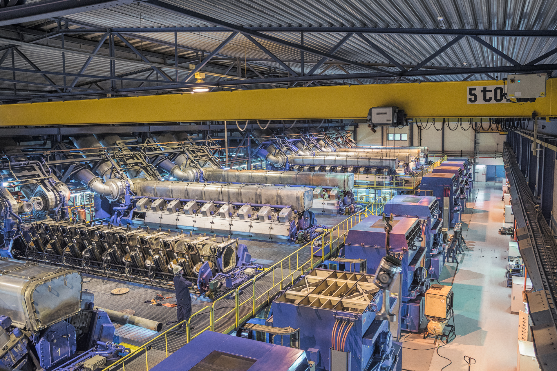 Planta eléctrica Pavana II en Honduras, con una capacidad instalada de 82 MW